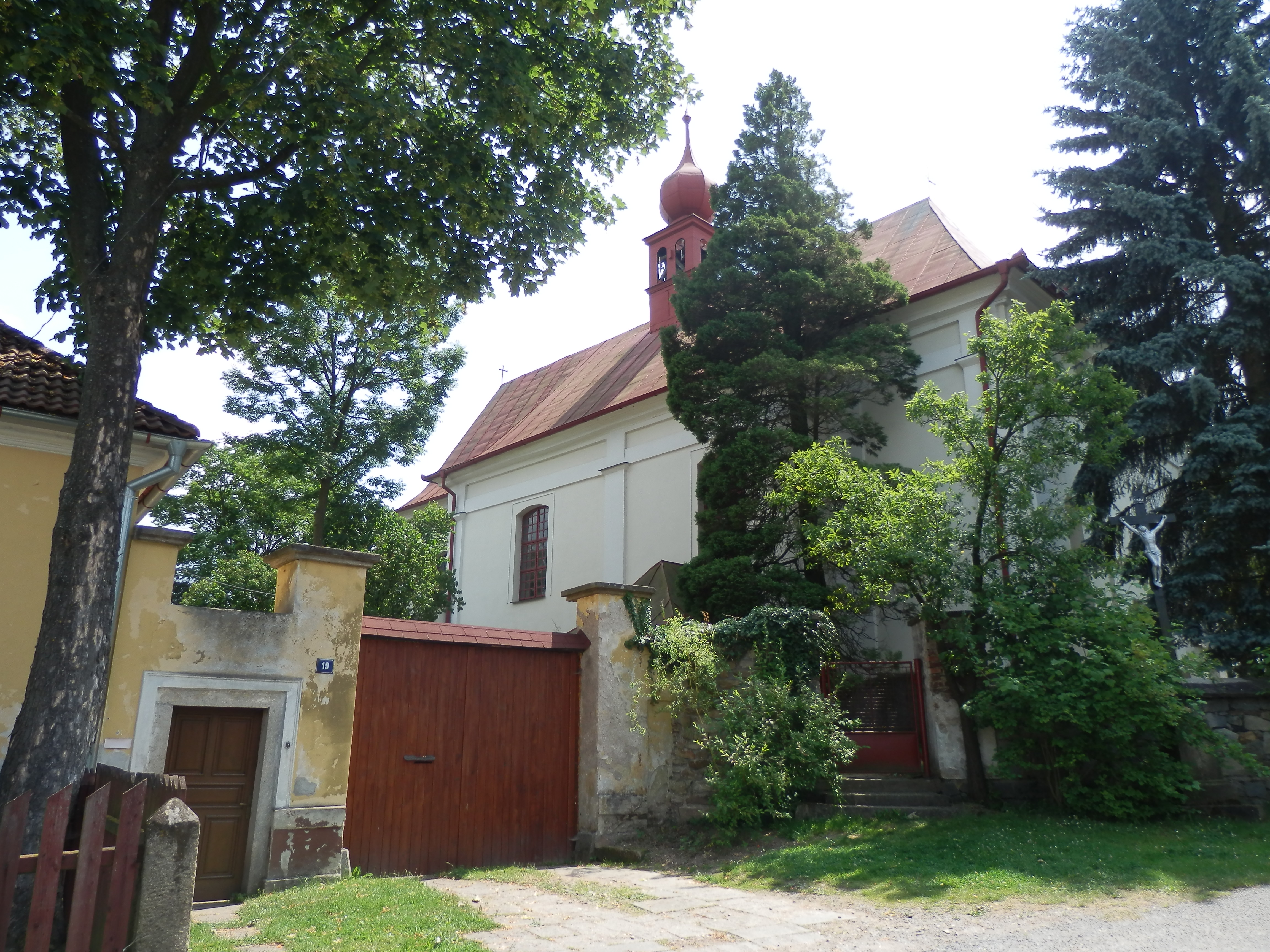 Kostel Nalezení sv. Kříže (Svatý Kříž), náves, Svatý Kříž